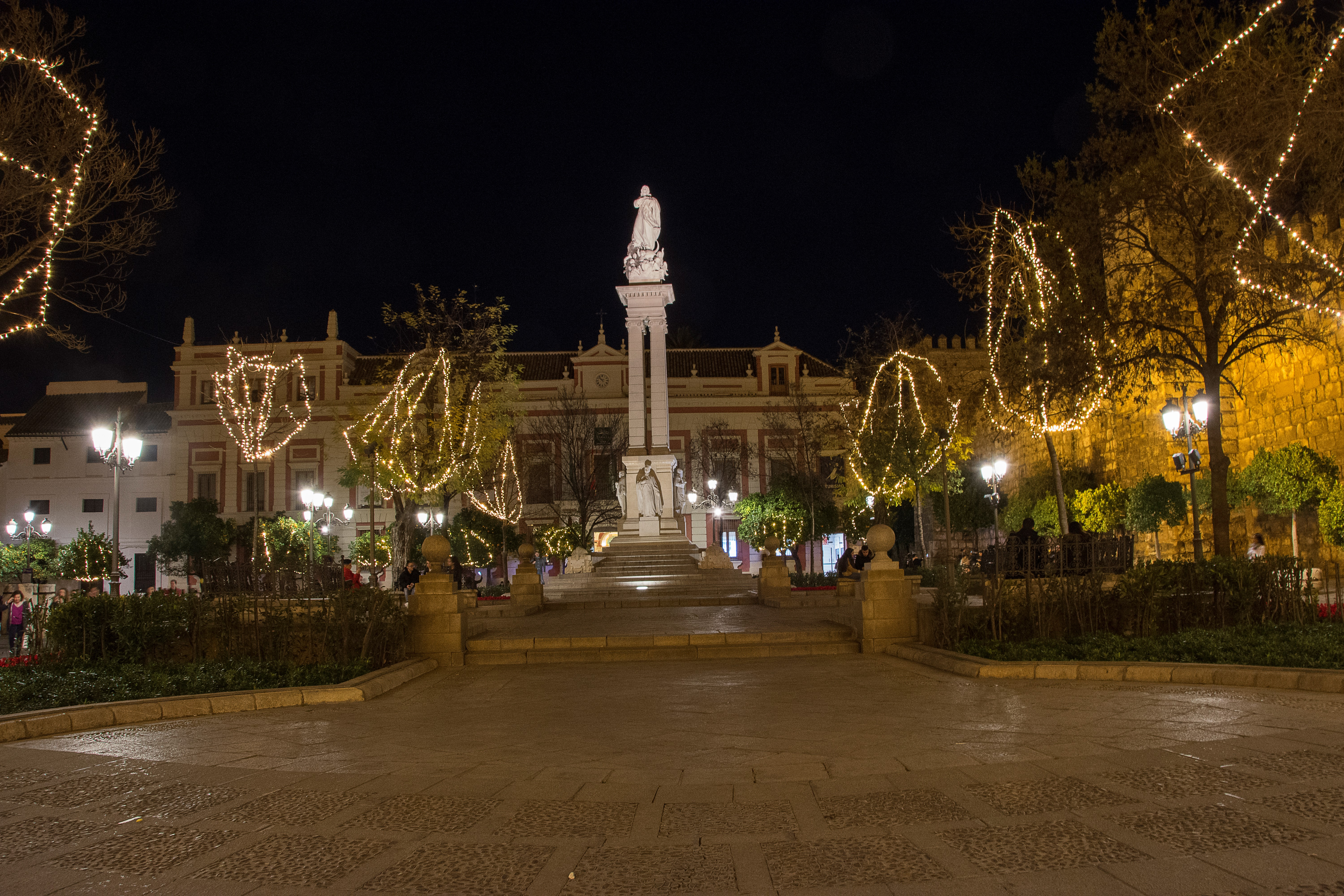 Plaza del Triunfo de Sevilla. En el centro el monumento a la Inmaculada Concepción. El arquitecto fue Juan Talavera y Heredia y las esculturas son obra de Lorenzo Coullaut Valera.